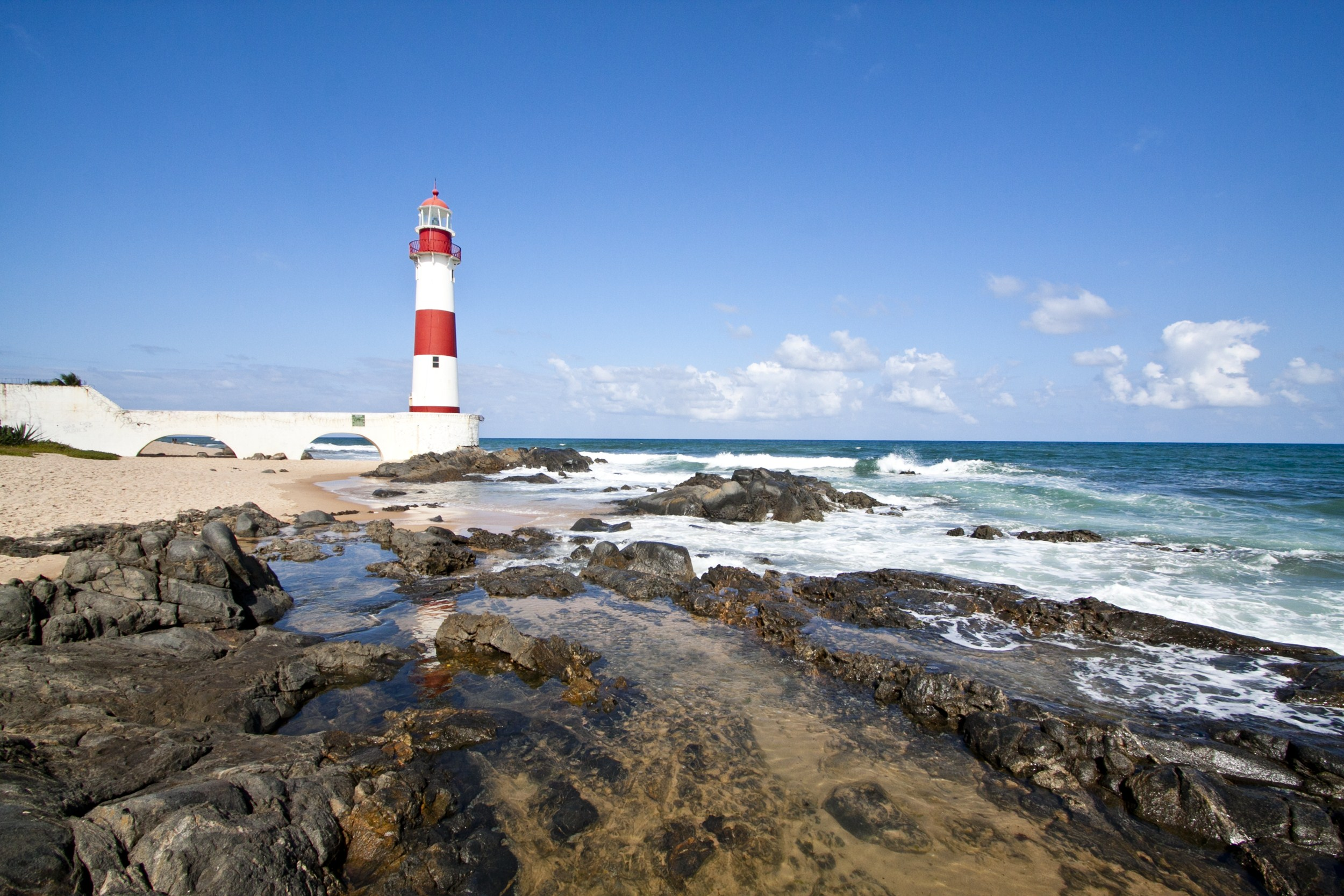 Farol de Itapuã.